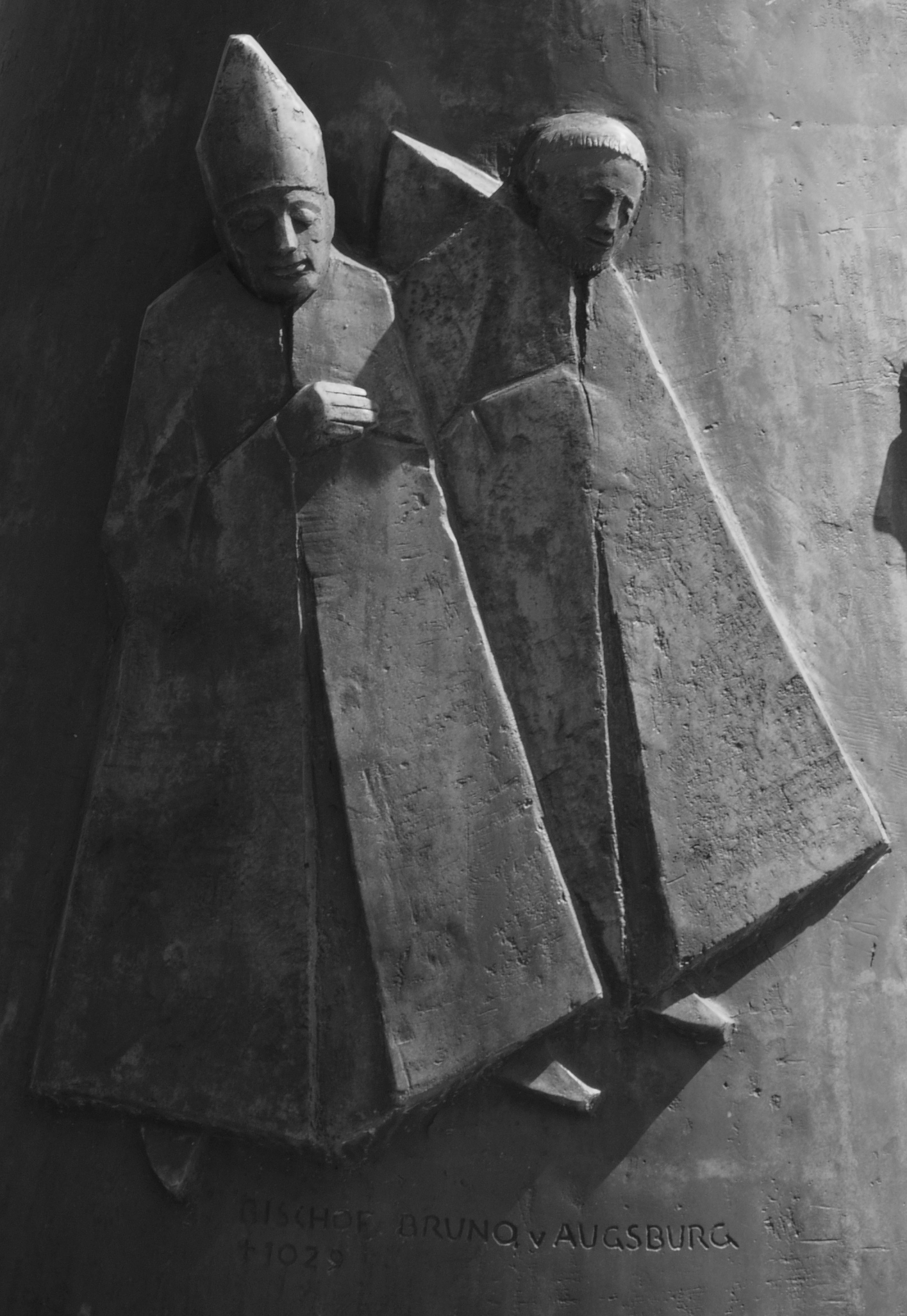 Geschichtskegel (Rolf Nida-Rümelin) bei der Donaubrücke Straubing; Bischof Bruno von Augsburg